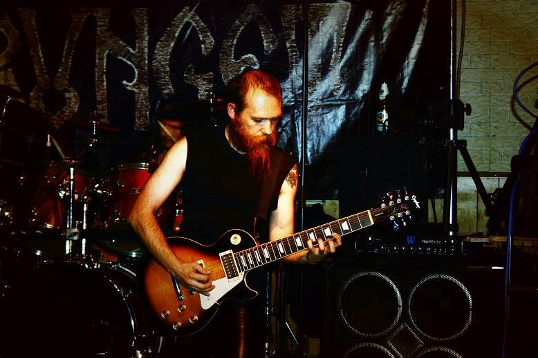 Sol'Faur Spurcatu, Gitarrist von Negură Bunget. Liveauftritt im "Einsiedel", Zella-Mehlis